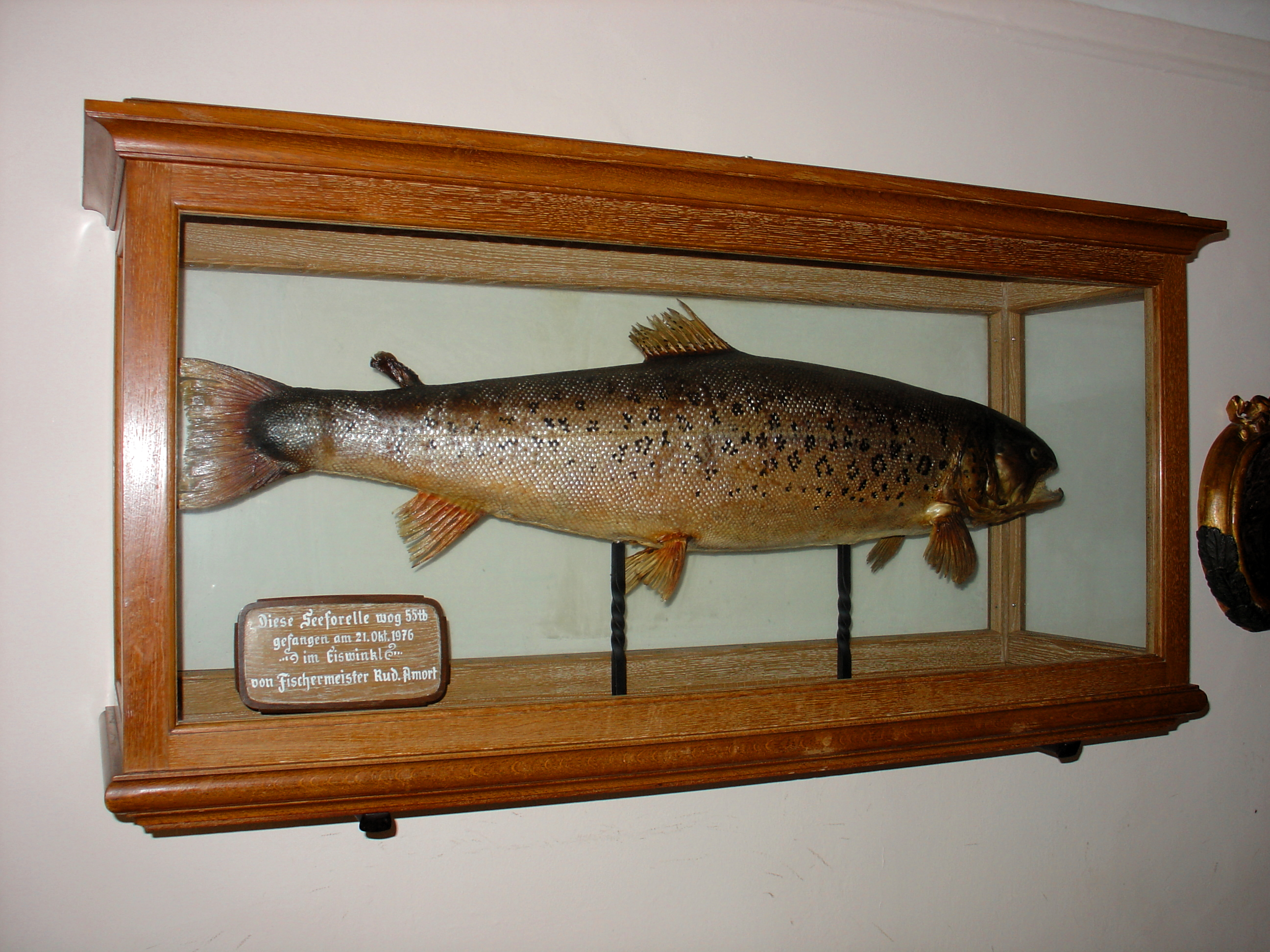 Eine Seeforelle (Salmo trutta lacustris)